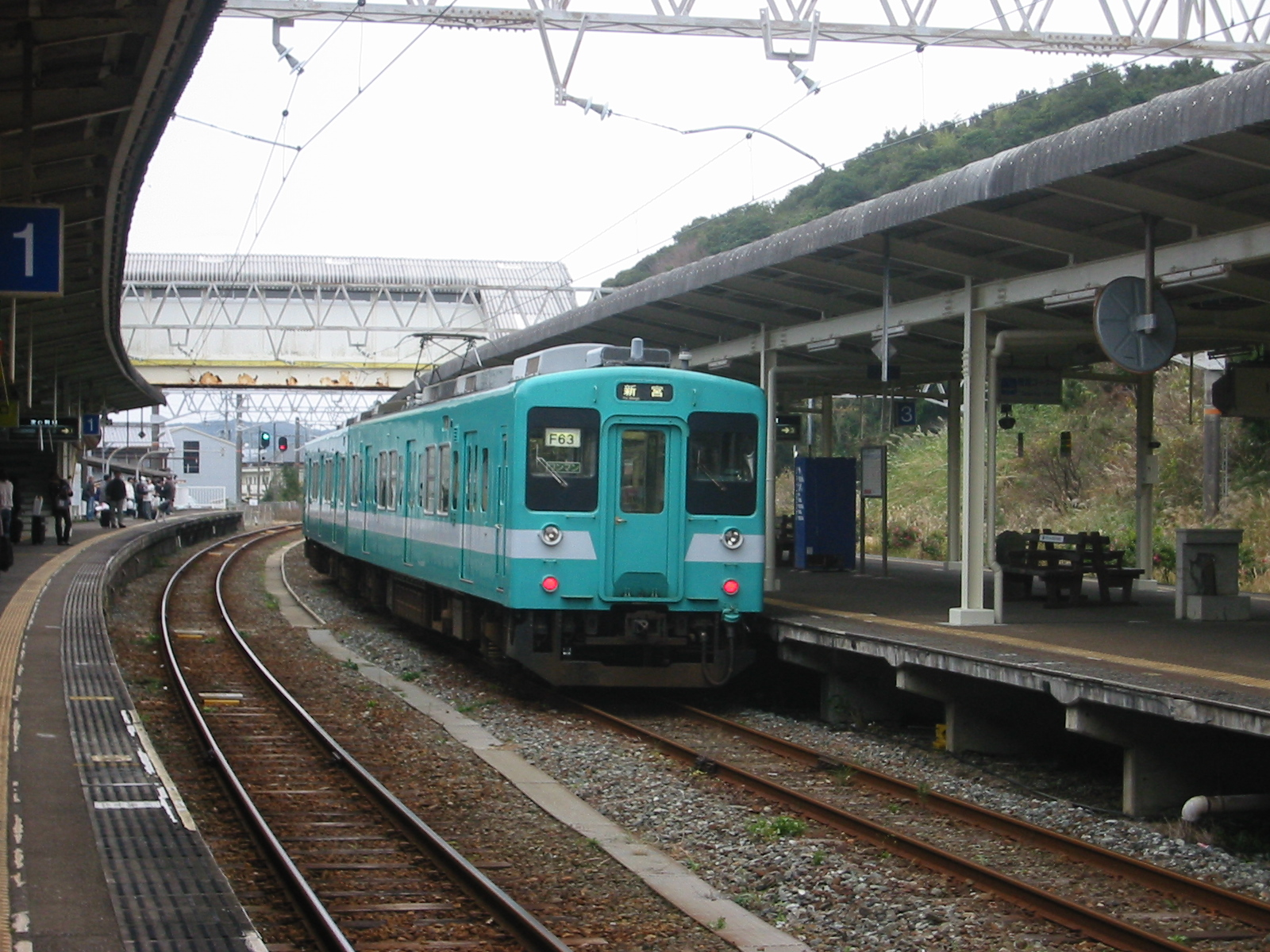 紀勢本線串本駅にて105系F63編成